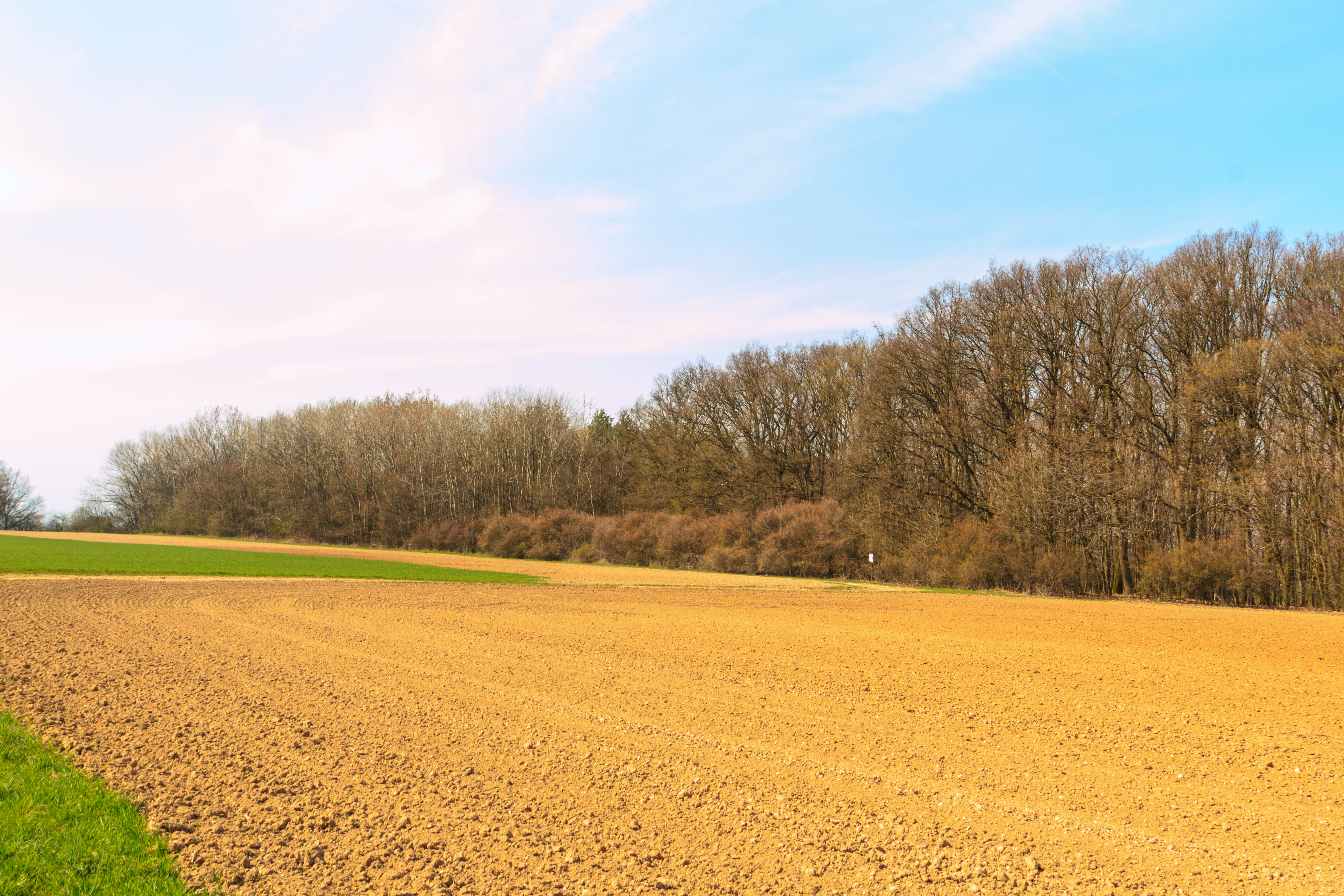 Přírodní památka Nad Blatinou Project: Chráněná území.